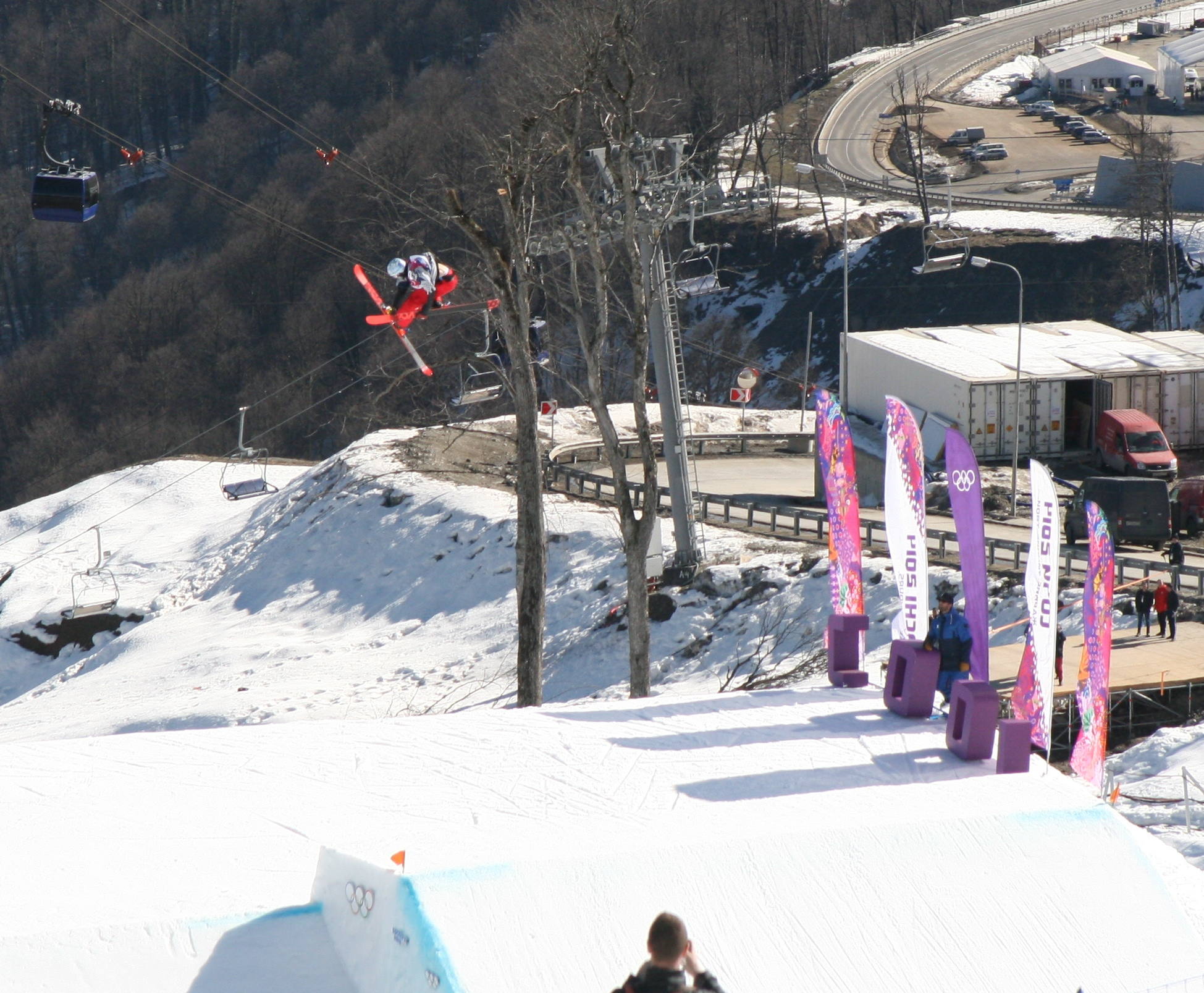 Соревнования по слоупстайлу на зимних Олимпийских играх 2014 в Сочи